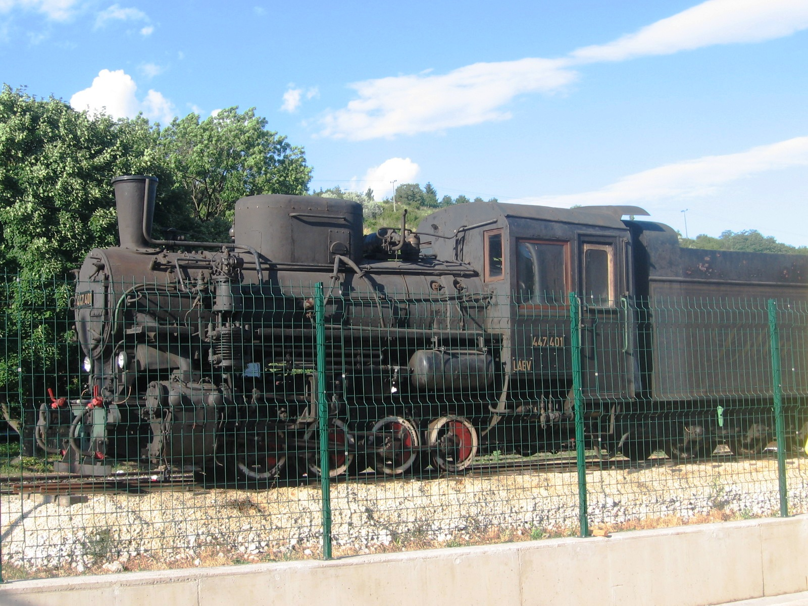 A Lilla nevű gőzmozdony Felső-Majláthon. A mozdony szokott nosztalgiavonatokat húzni (Miskolc)